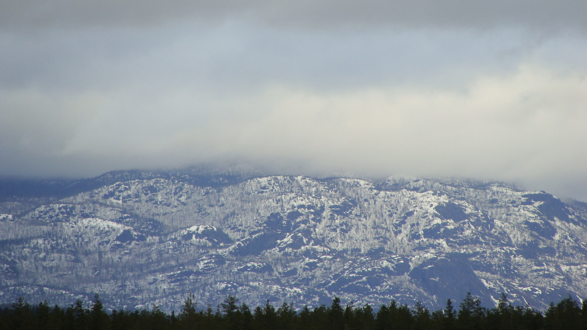 Monts Valin, au Saguenay (Québec, Canada)